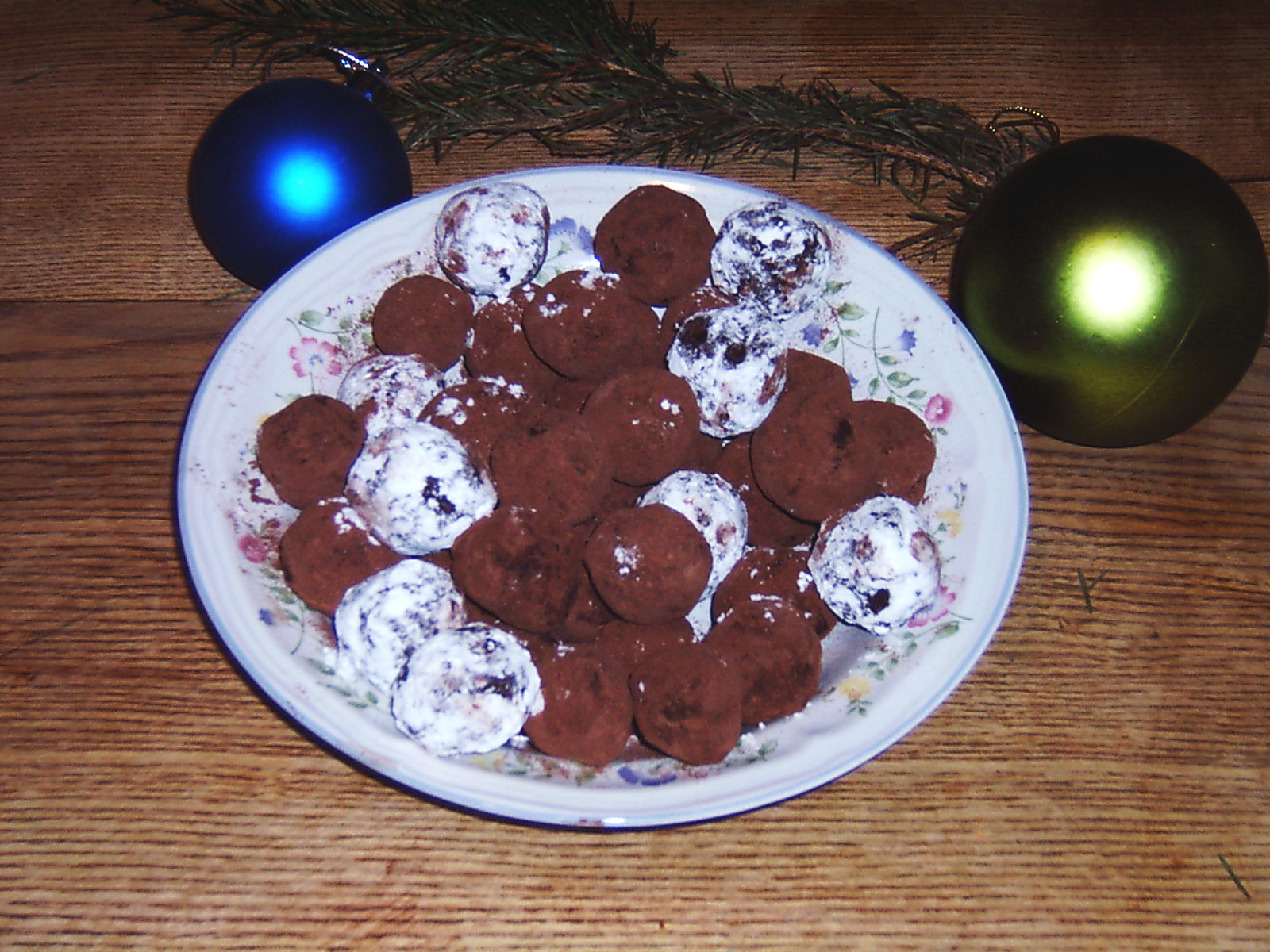 des truffes... que j'ai fais moi même.